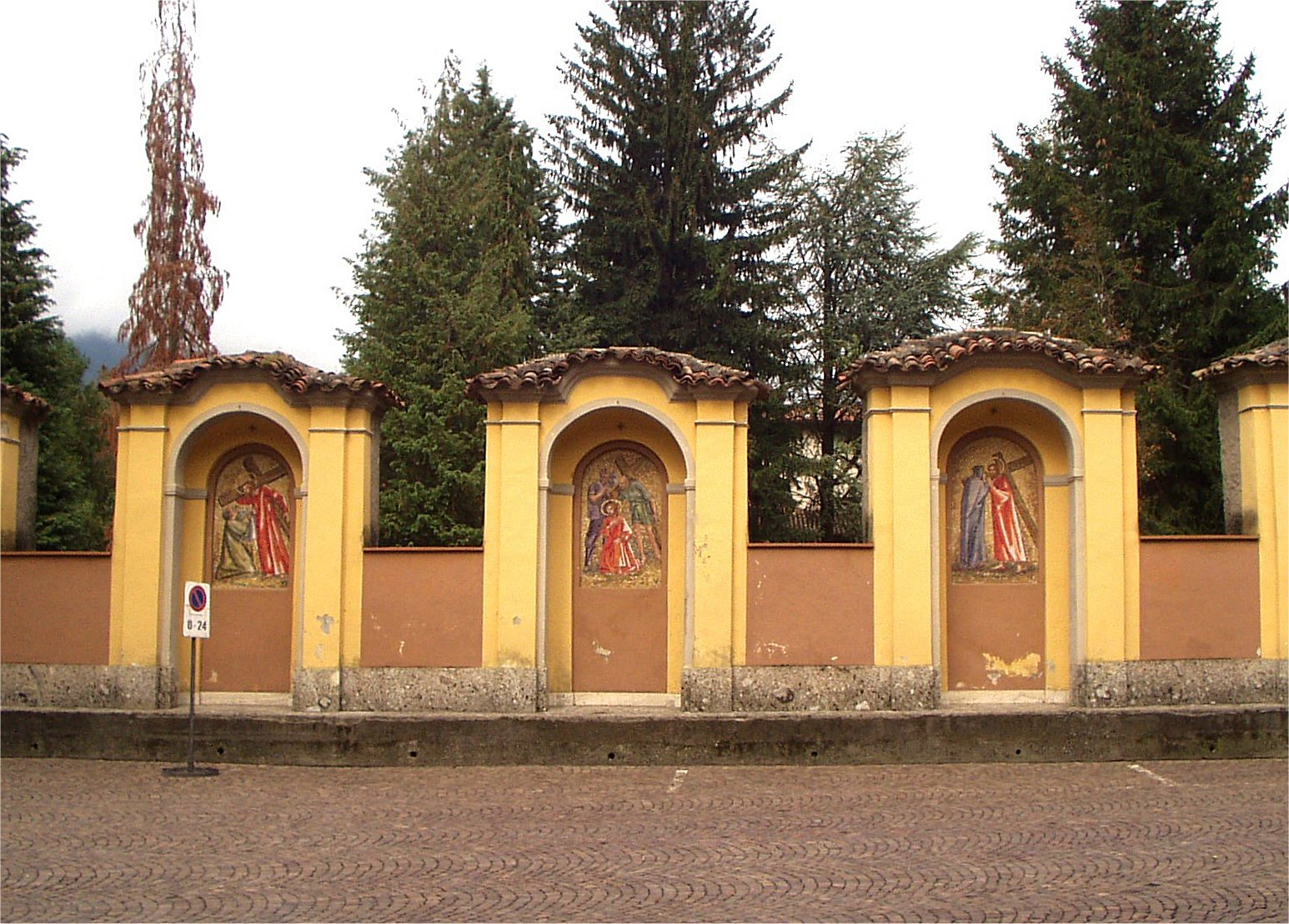 Monasterolo del Castello via crucis stazioni IV - V - VI